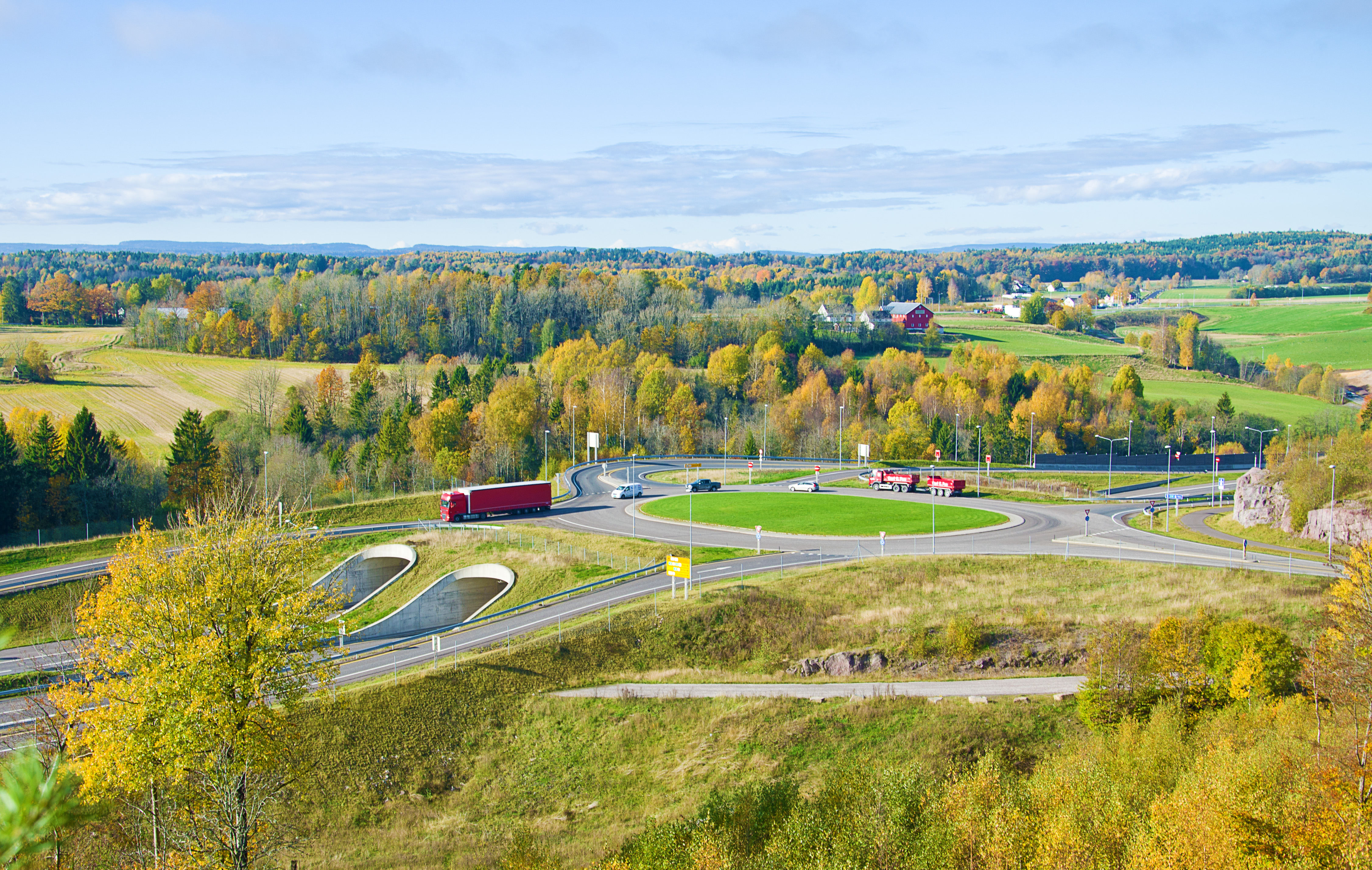 Undrumsdalskrysset, avkjøring 34 på E18 i Vestfold. Stenbjørnrød miljøtunnel går under rundkjøringen. Krysset har armer til riksvei 19 mot Horten og fylkesvei 306 mot Høyjord og Lågendalen.